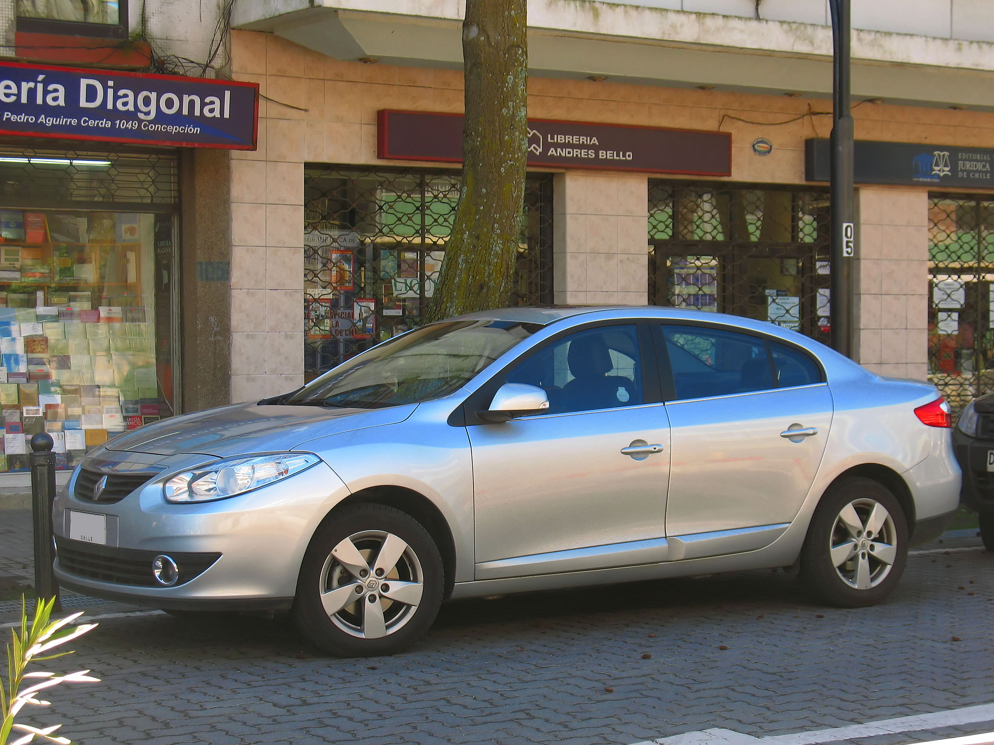 Renault Fluence 2.0 Privilege 2012